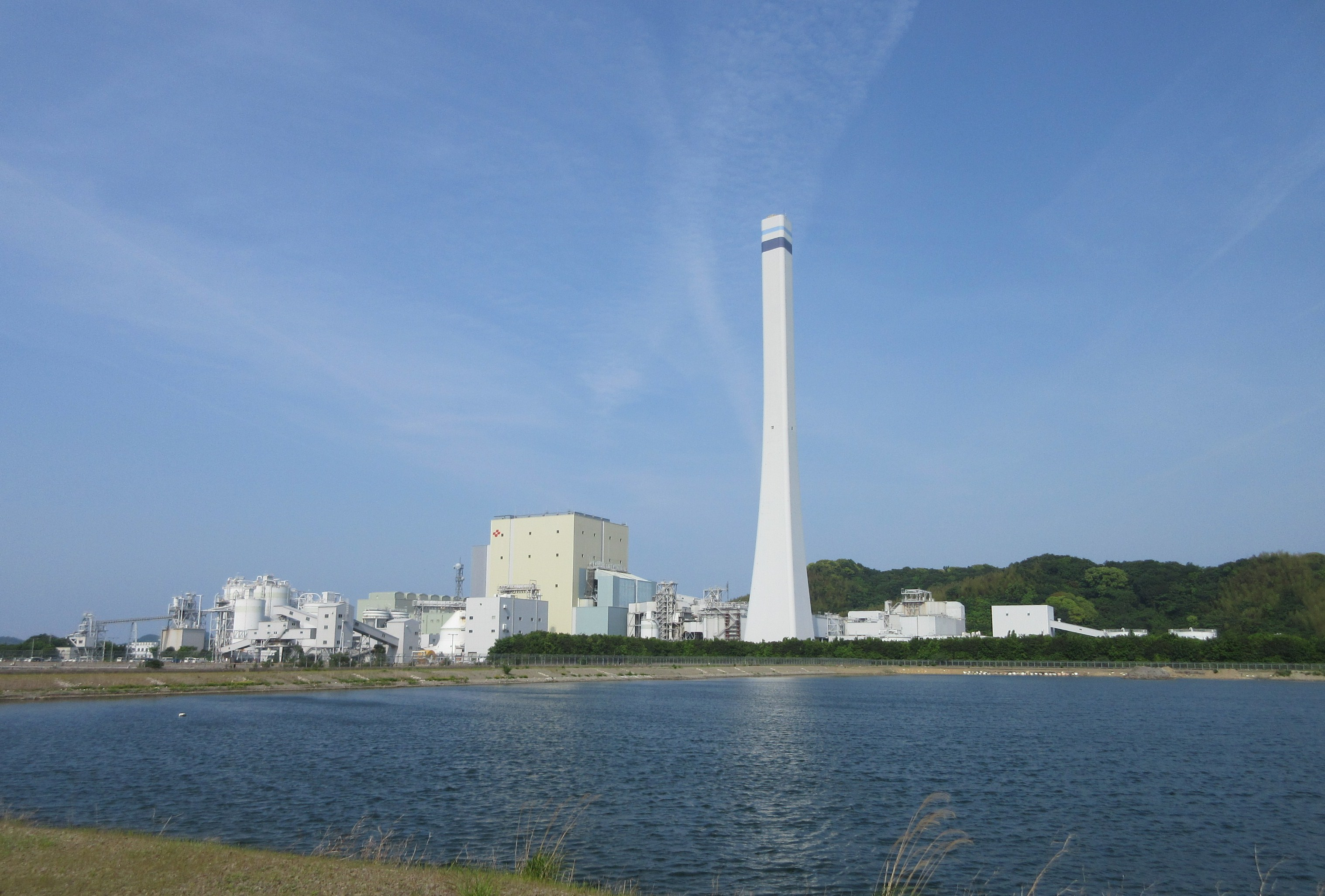 四国電力橘湾発電所